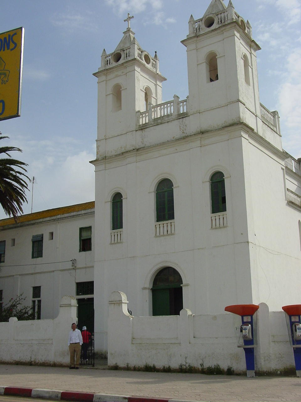 Iglesia de San Bartolomé en Arzila